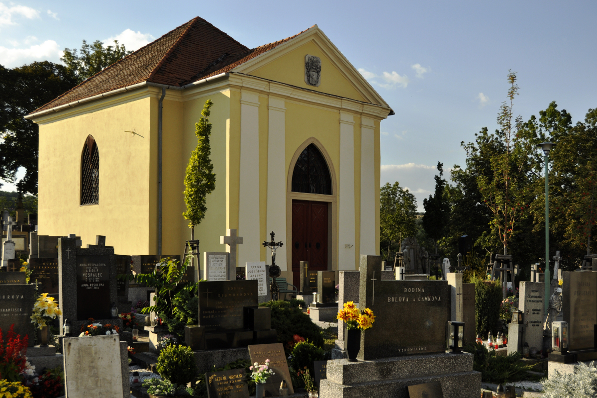 Kaple hřbitovní (Oslavany), na hřbitově, Oslavany